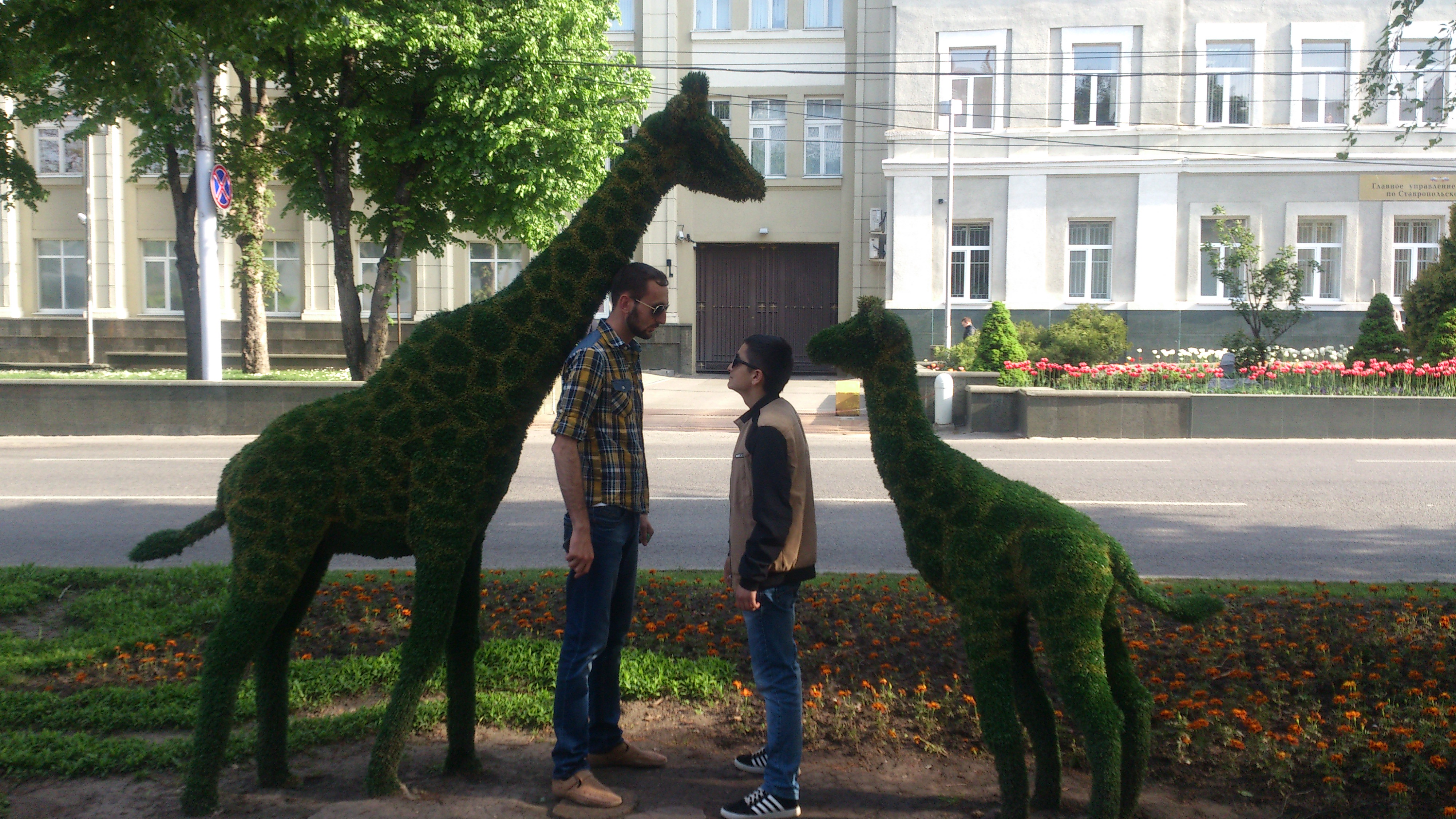 КВН Арцах